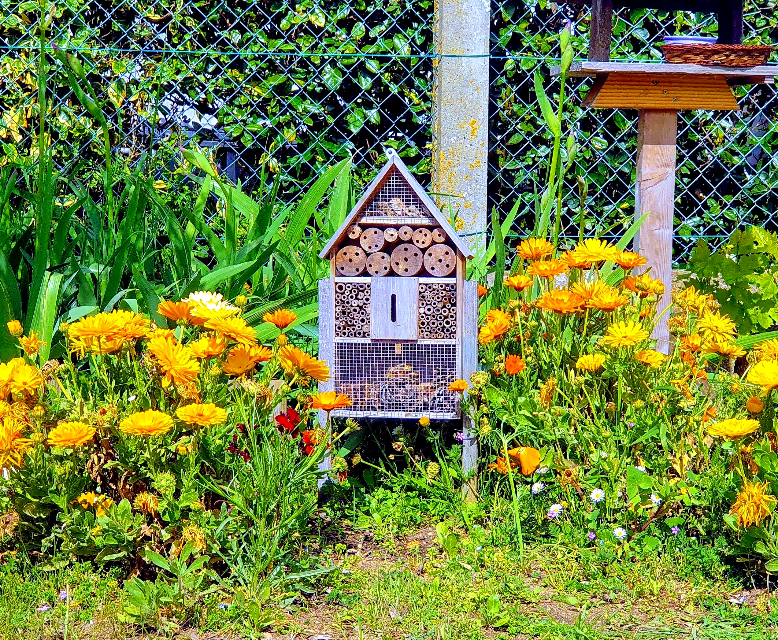 Hôtel à insectes au fond du jardin